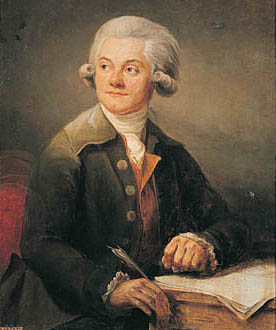 Louis de Fontanes, professeur de belles-lettres à l’École centrale des Quatre Nations. Huile sur toile. Conservée au Châteaux de Versailles et de Trianon